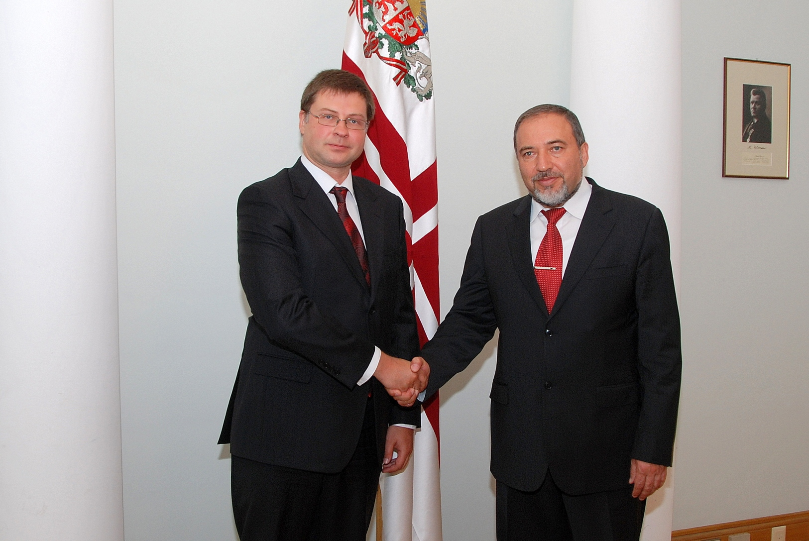 Ministru prezidents Valdis Dombrovskis un Izraēlas premjerministra vietnieks un ārlietu ministrs Avigdors Libermans